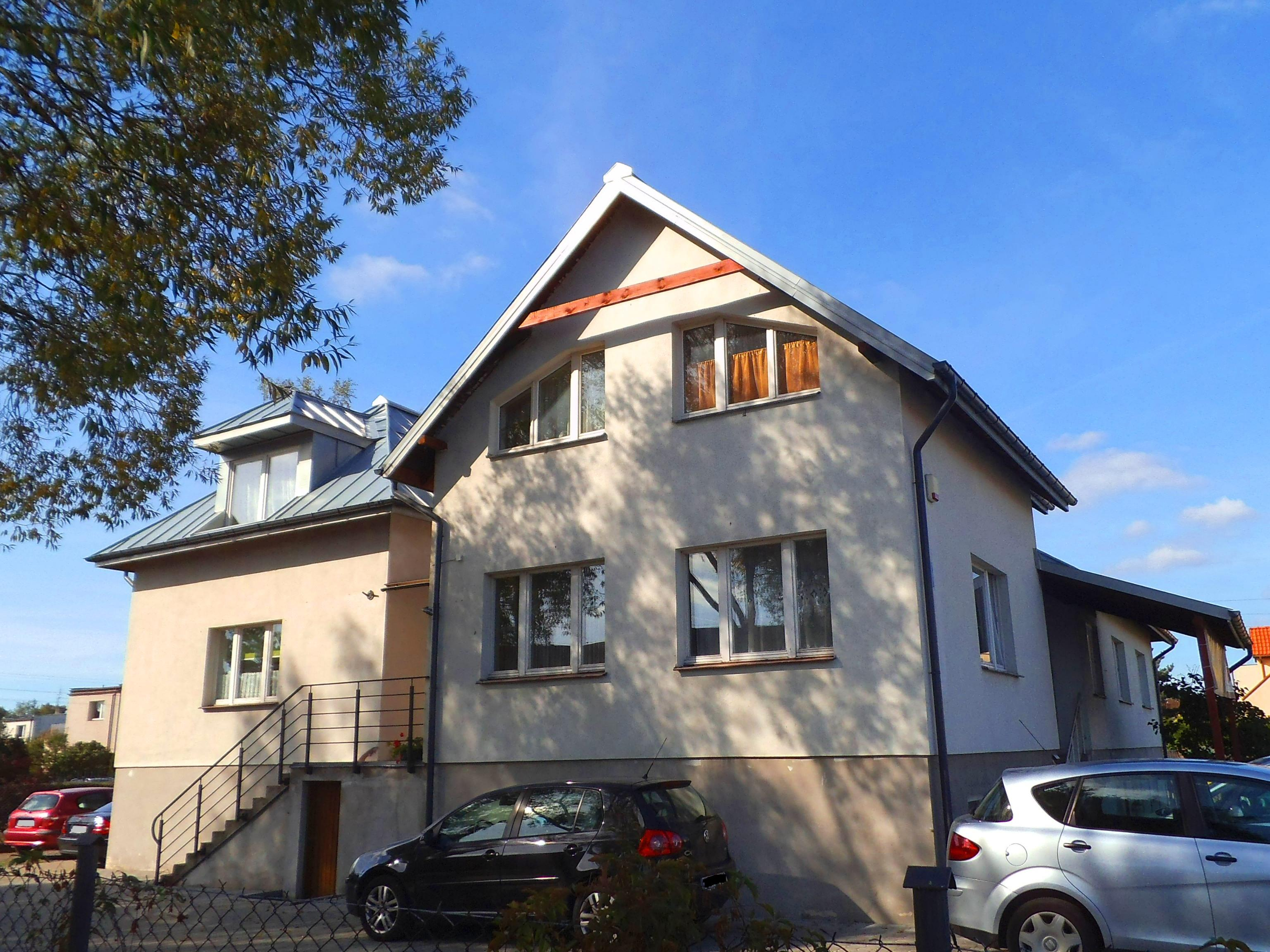 Dom Kultury parafii Matki Bożej Nieustającej Pomocy w Toruniu